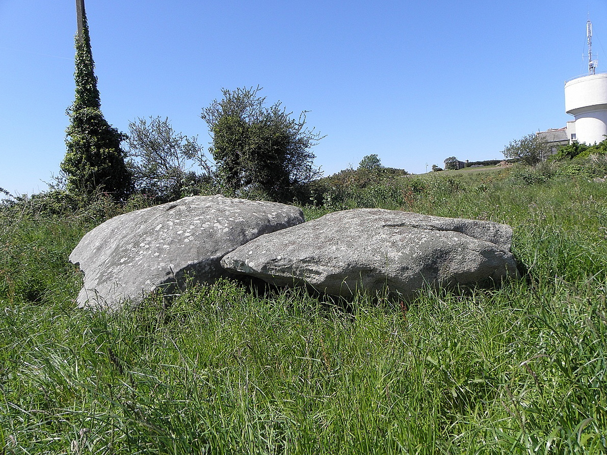 Dolmen de Créac’h-ar-Vren sis à Plouescat (29).